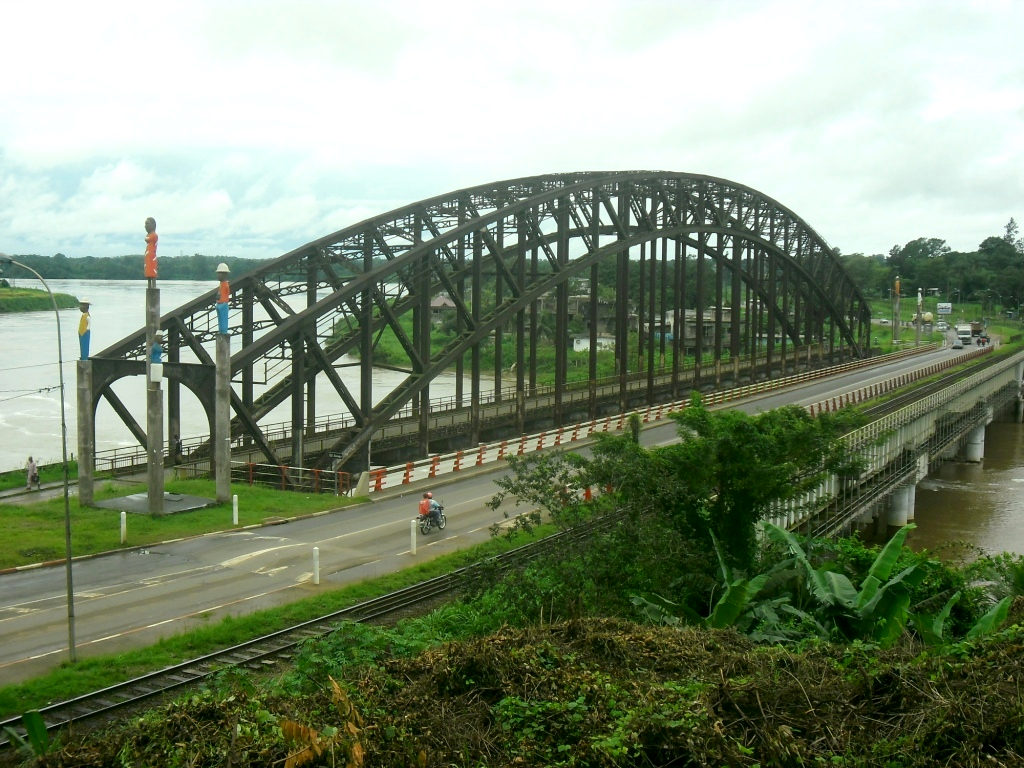 Pont d'Édéa